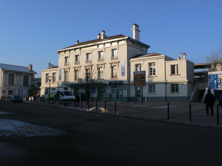 Brétigny-sur-Orge (Essonne, France) : La gare.